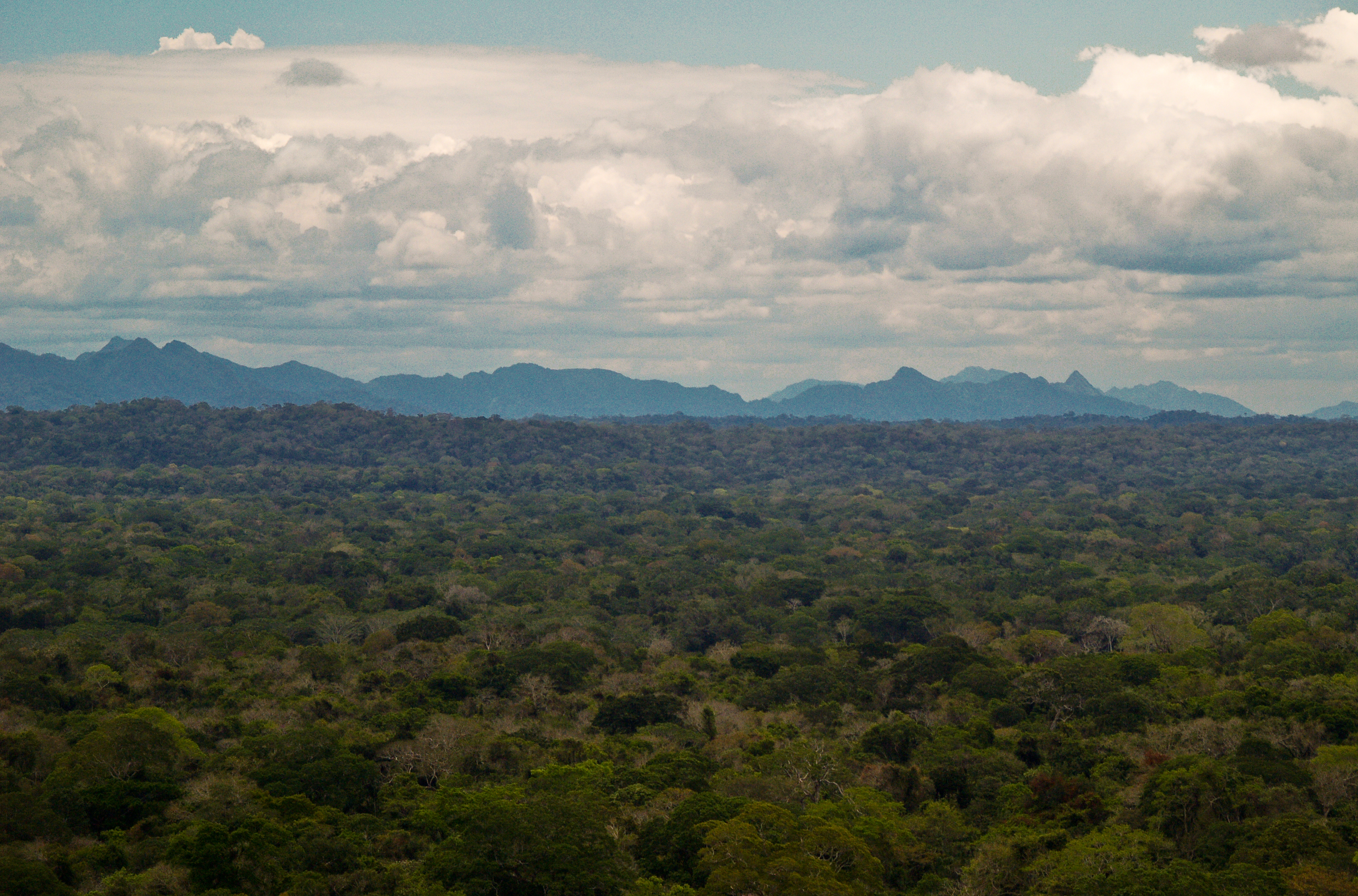 vista de las estribaciones andinas y los llanos del Parque Nacional Madidi en el departamento de La Paz, Bolivia.